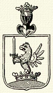 Blason de la famille hongroise Losonczi Bánffy.